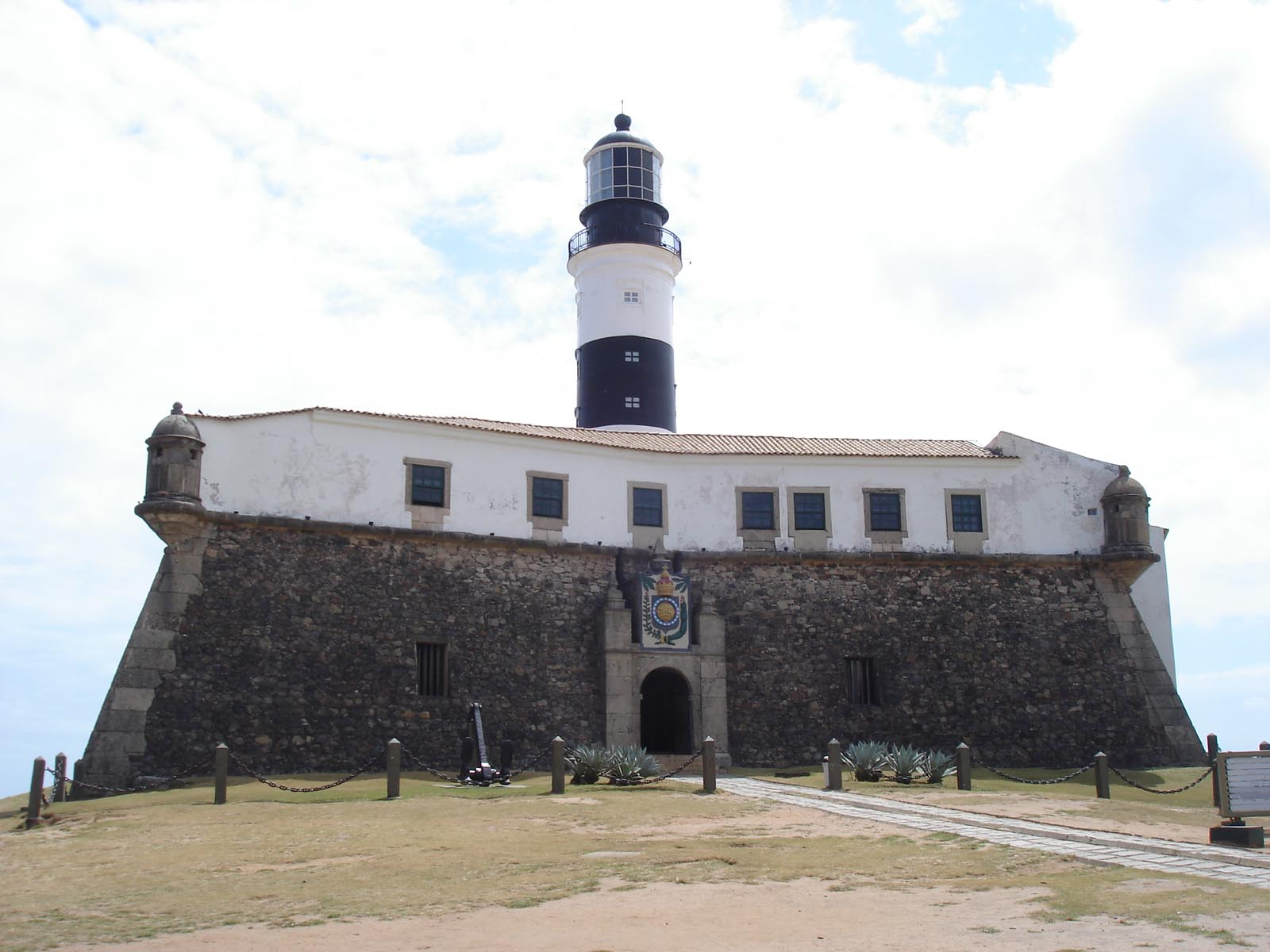 Farol e Forte da Barra, Salvador (Bahia), Brazil.